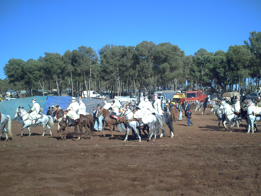 Fantasia Mostaganem 28-05-2008